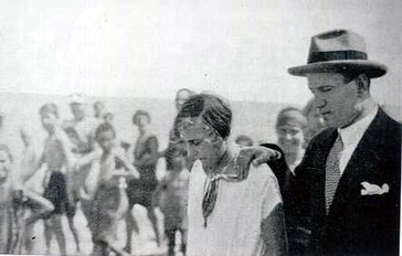 Benito Mussolini e la figlia Edda sulla spiaggia di Cattolica.